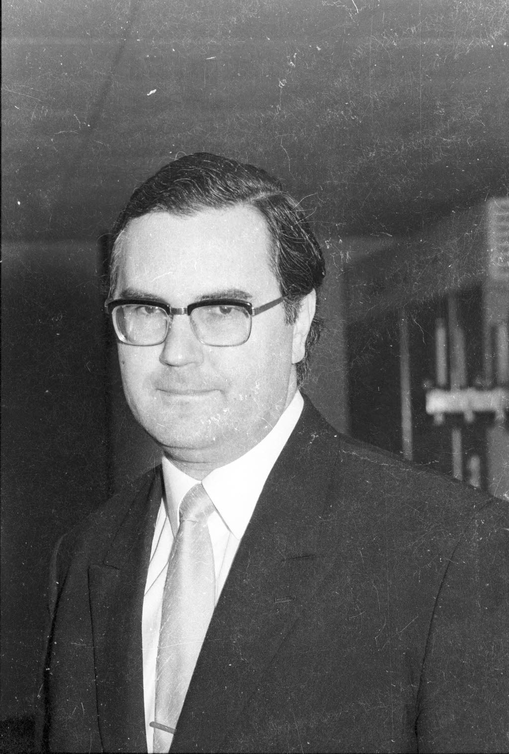 Professor für Altes Testament an der Christian-Albrechts-Universität (CAU).